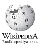 Kurdî: Wikipediya Logo